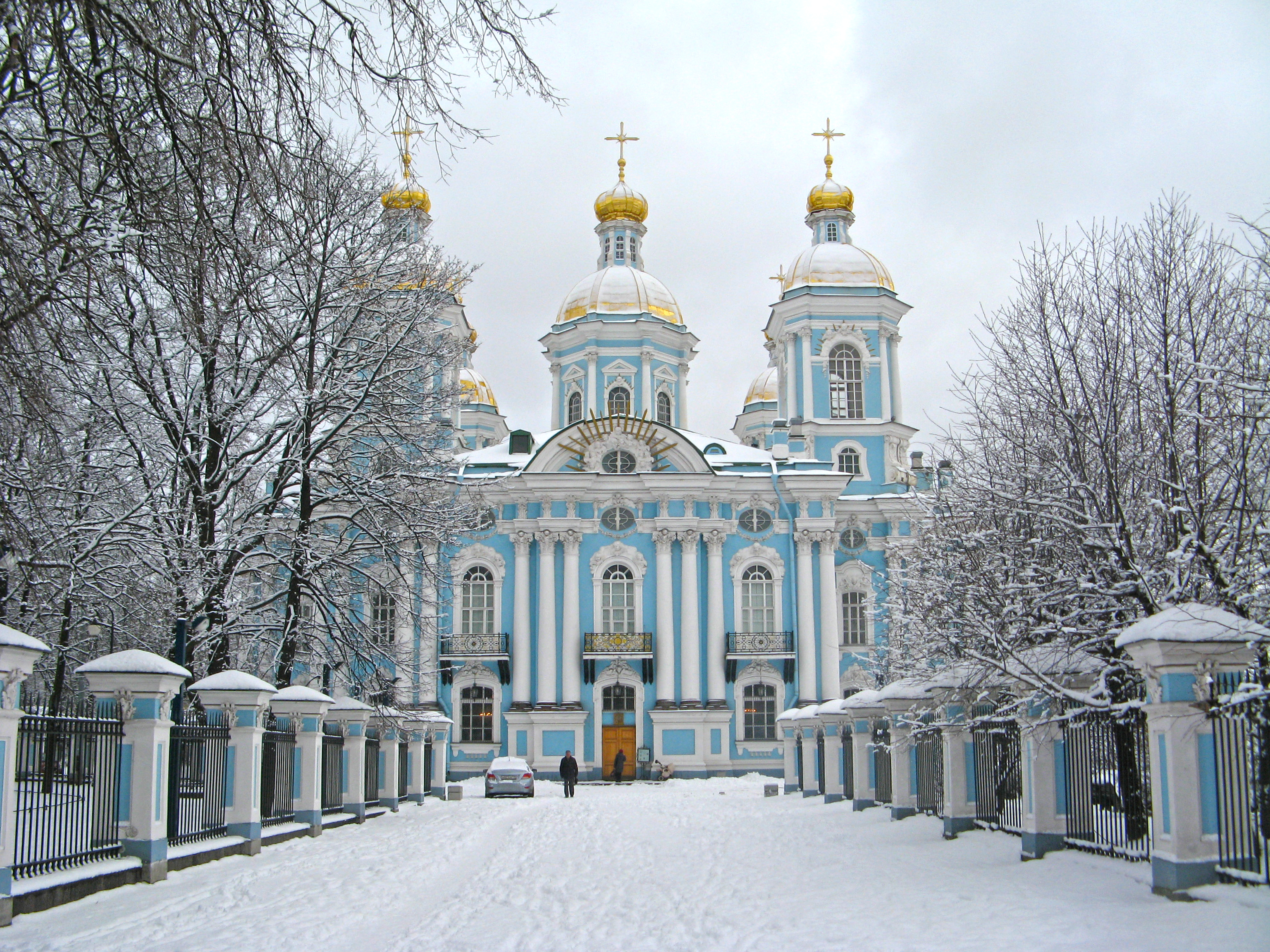 Николо-Богоявленский (Морской) собор: Никольская площадь, 1 корпус 3, Адмиралтейский район, Санкт-Петербург